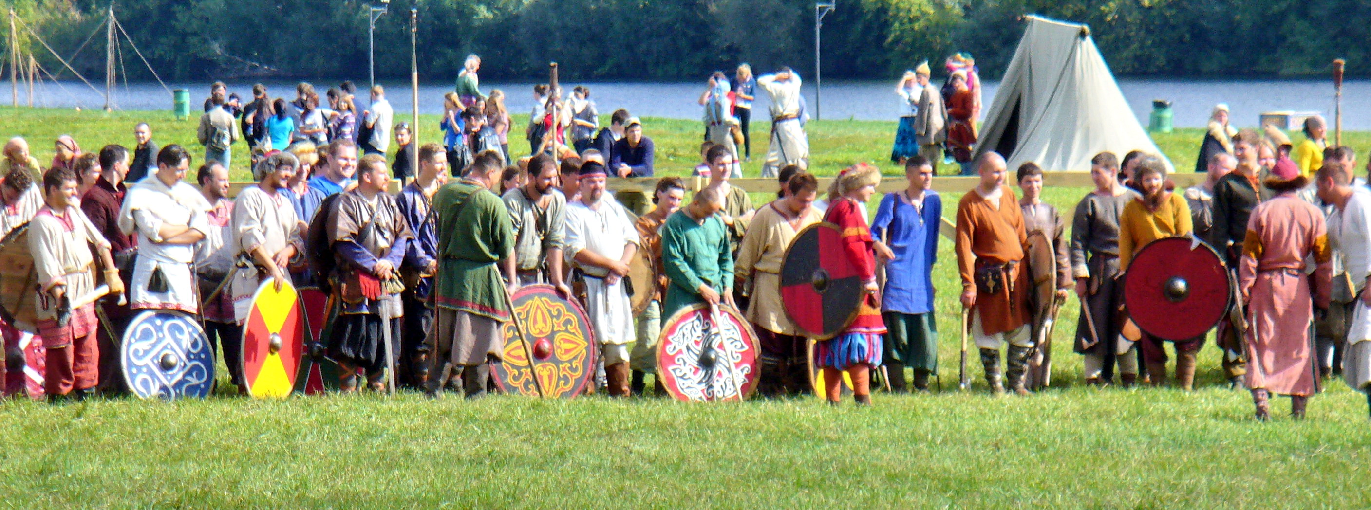 Фестиваль исторической реконструкции "Времена и эпохи" в Коломенском.